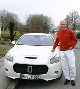 Erich Bitter, deutscher Autodesigner, Rad- und Autorennfahrer, vor dem „Bitter Insignia“